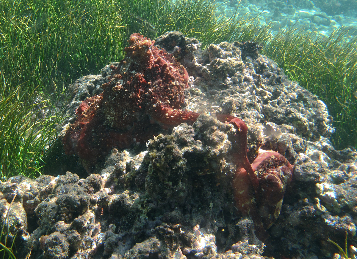 Accouplement de poulpes de récif Octopus cyanea à la Réunion.